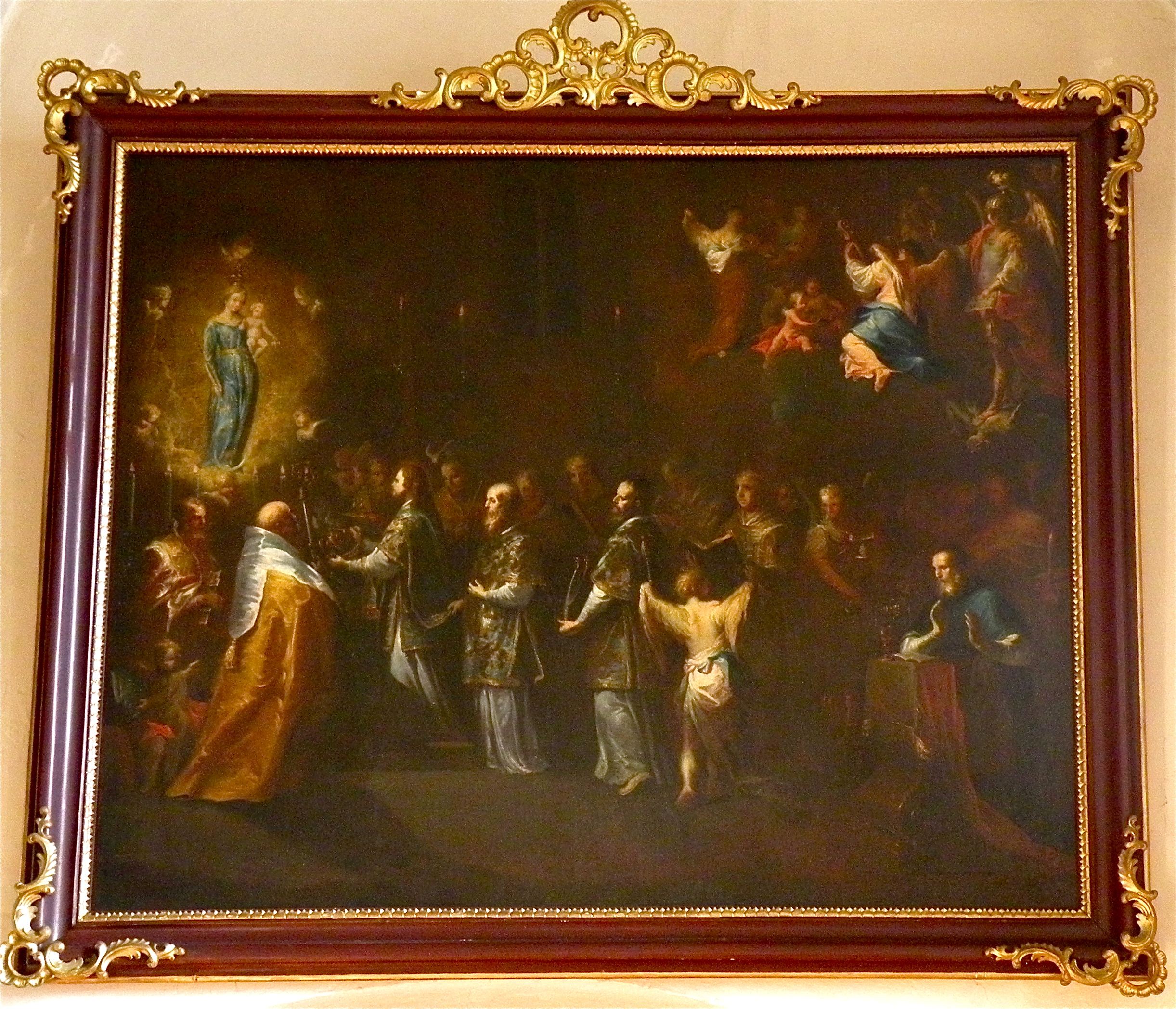 Die Engelweihe von Maria Einsiedeln (1750) ist das erste von Kremser Schmidt (Martin Johann Schmidt) in Oberösterreich gemalte Bild (signiert Kremser Schmit). Es hängt in der Pfarrkirche Münzbach im Bezirk Perg in Oberösterreich und wurde für die damalige Klosterkirche des Dominikanerklosters Münzbach gemalt.